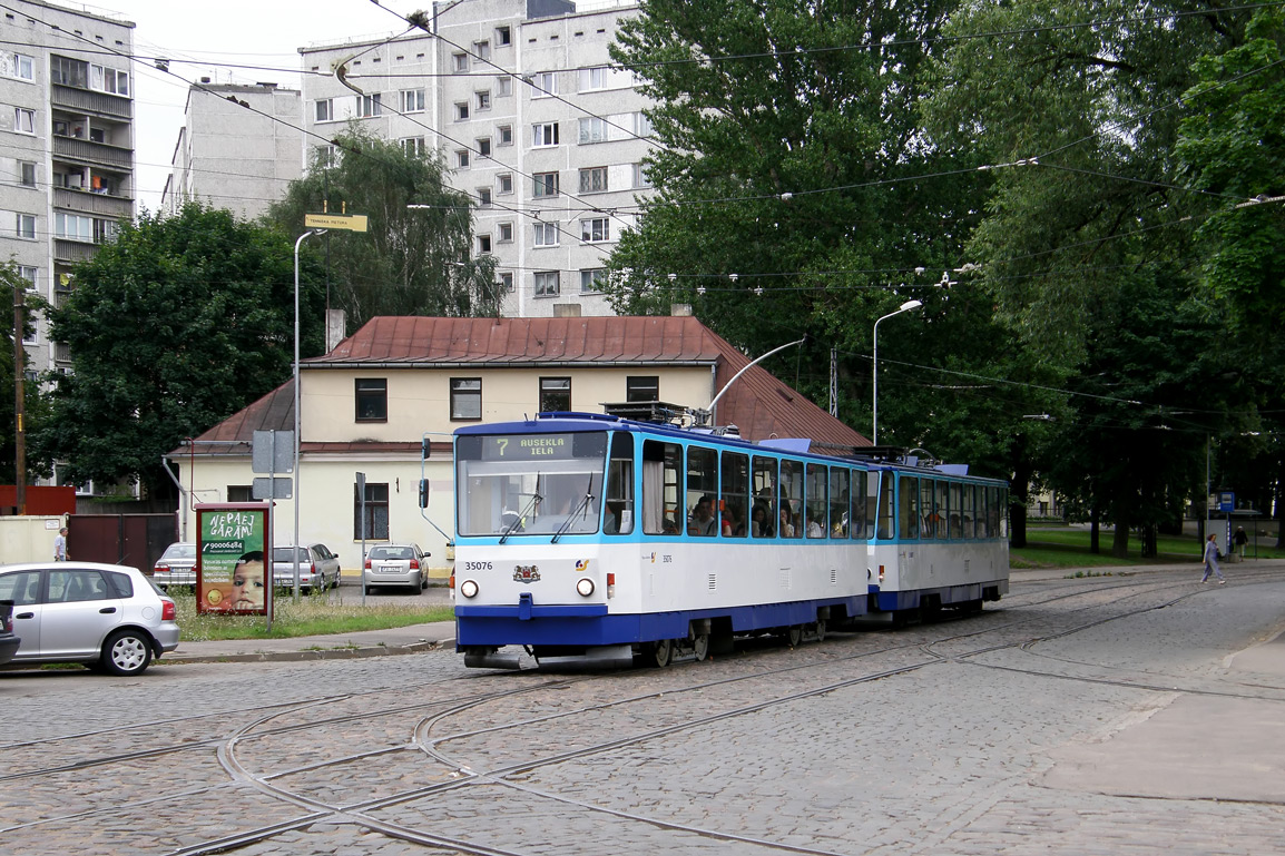 Maskavas Forštate, Latgale Suburb, Riga, Latvia